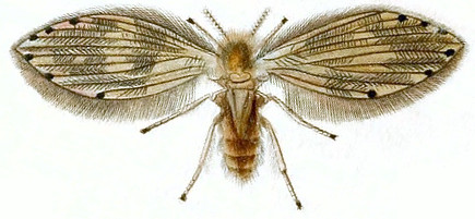 Tinearia alternata